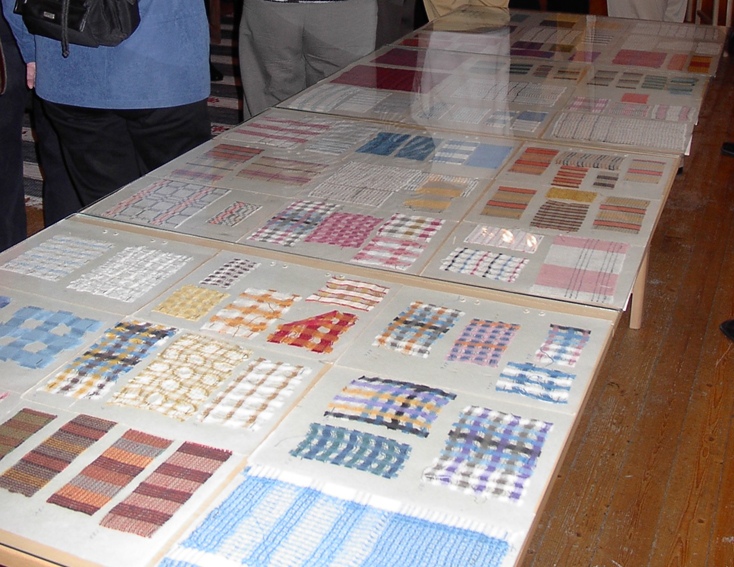 Matta formgiven av Ida Sahlström.